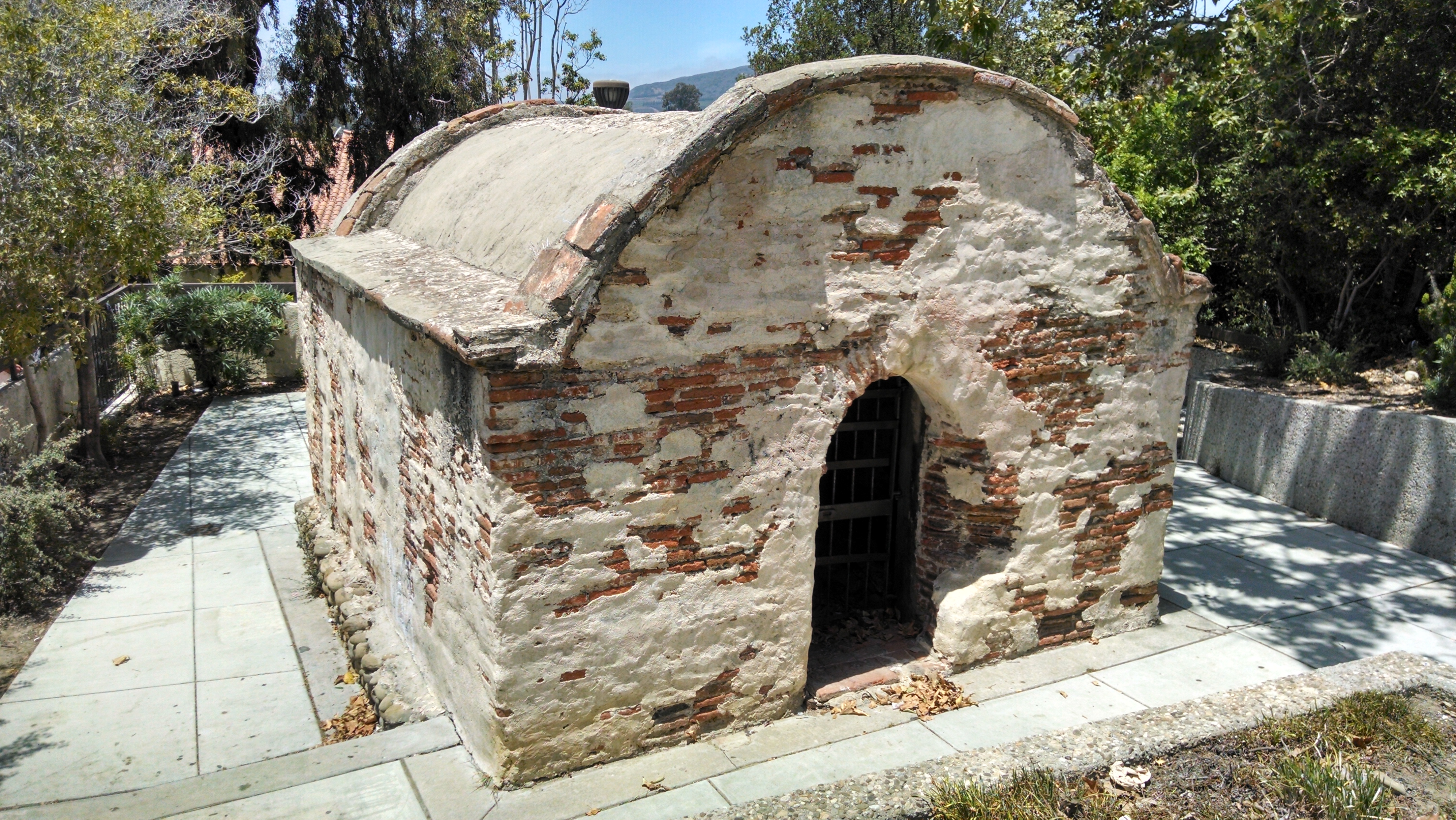 Ventura aqueduct